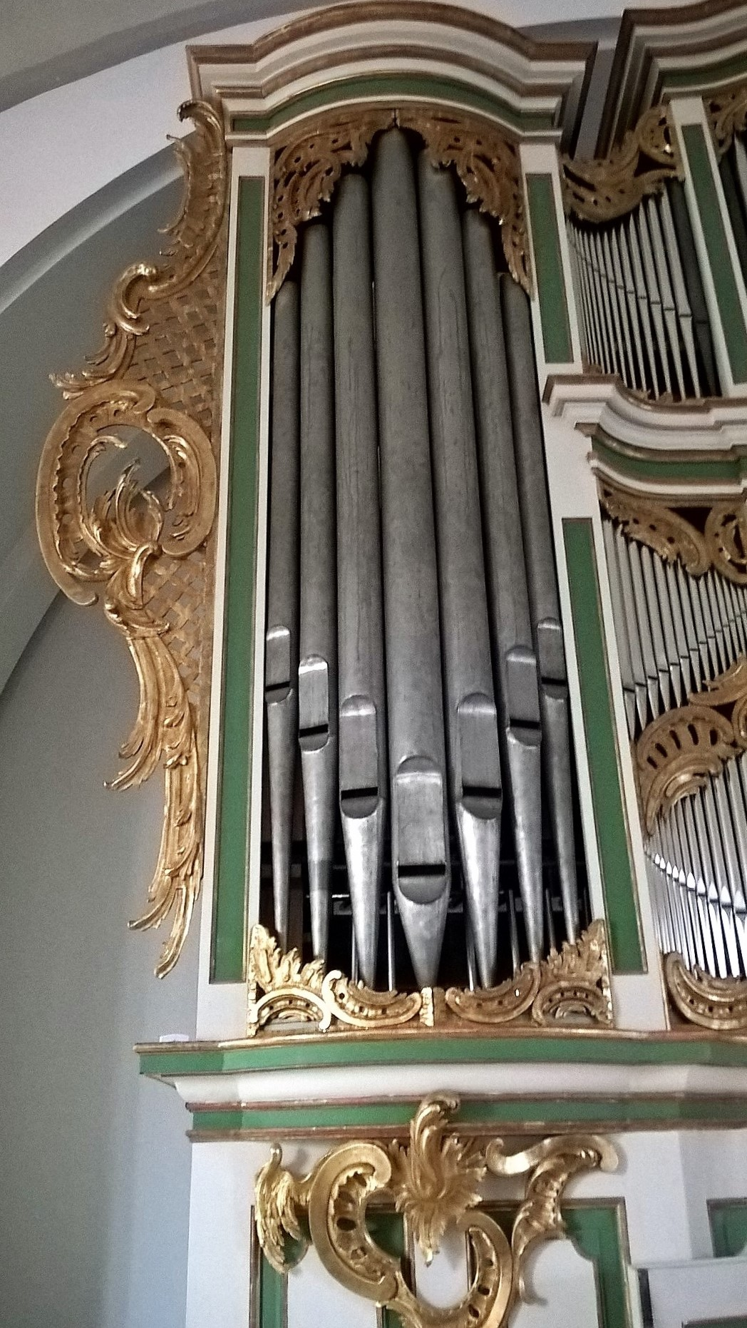 Orgel der Kirche Zur Frohen Botschaft, Berlin-Karlshorst, Deutschland